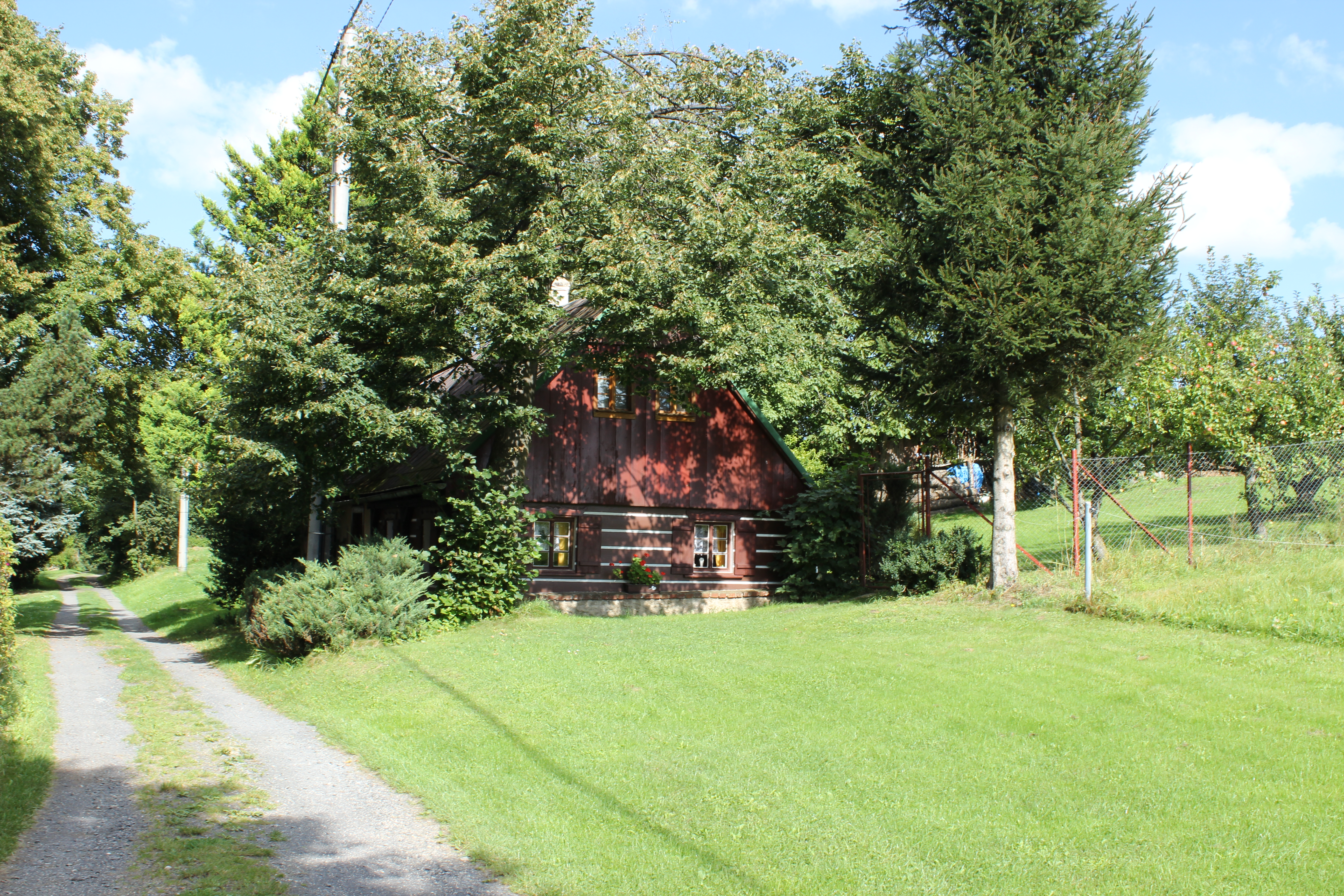 Dům evideční číslo 20 v Pekle, části Raspenavy.